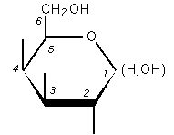 D-galactopyrannose. Avril 2005 Création personnelle